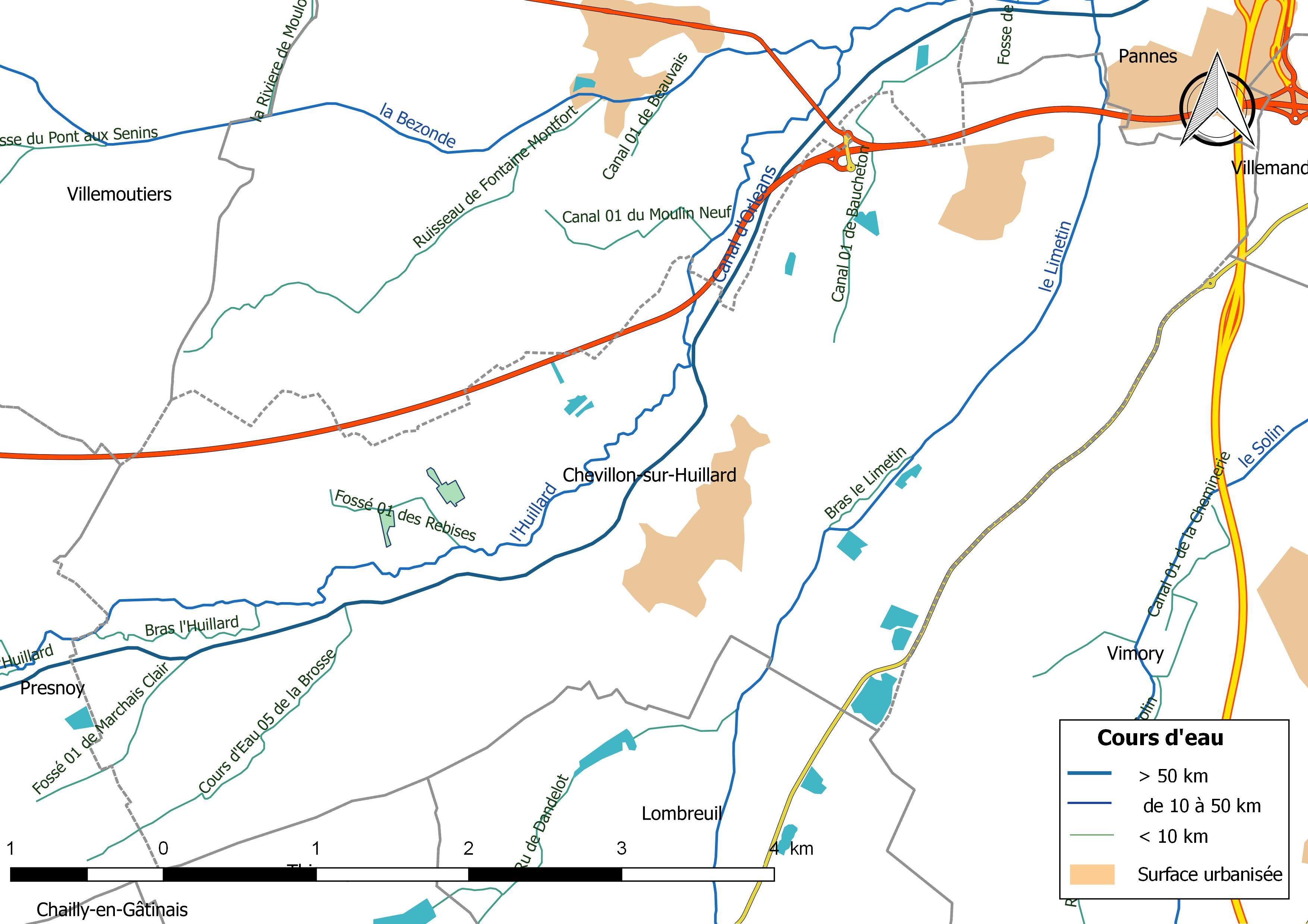 Carte du réseau hydrographique de la commune de Chevillon-sur-Huillard (France).